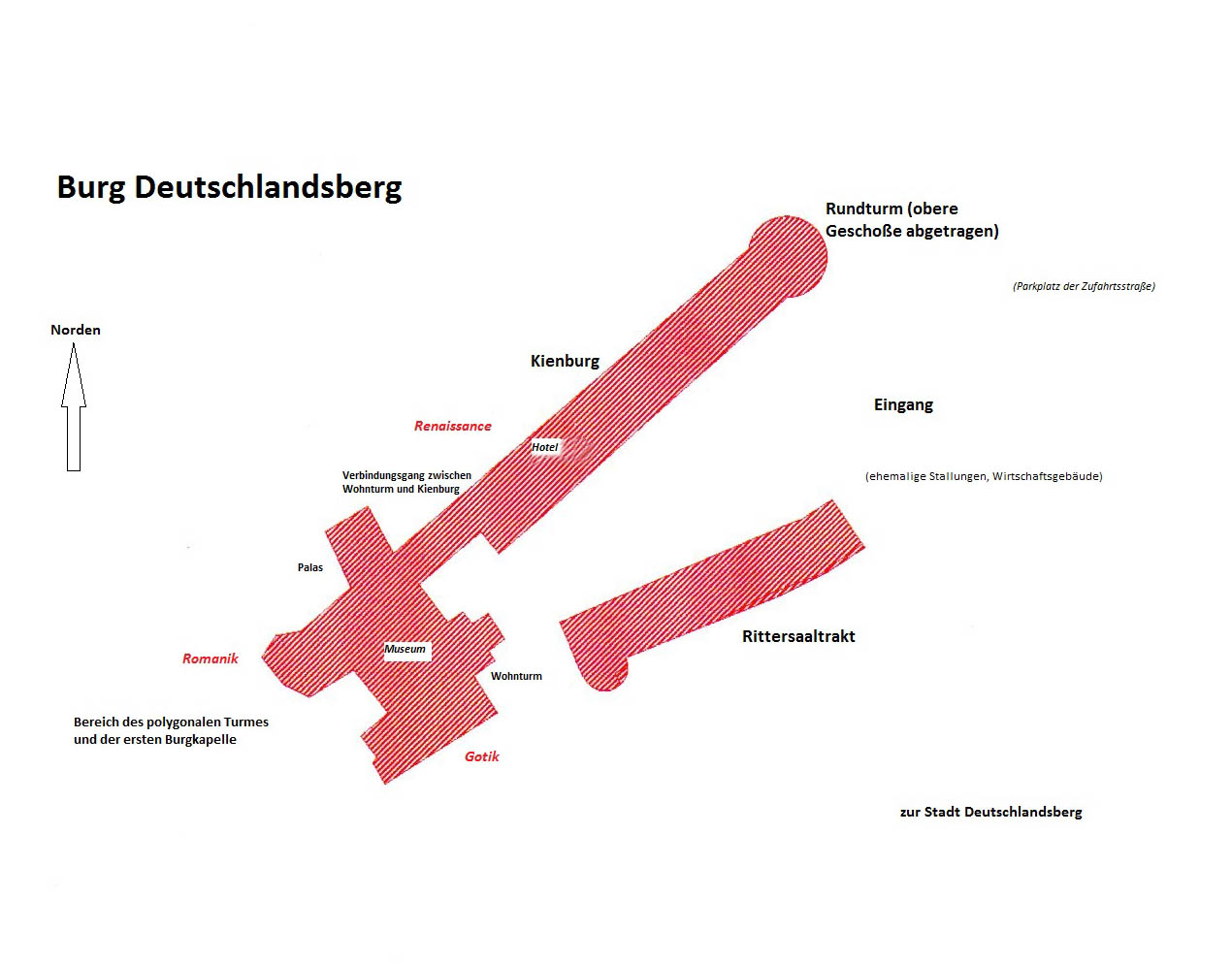 Burg Deutschlandsberg,Steiermark, Österreich: schematische Darstellung der Gebäude, ihrer Nutzung und ihres Alters.